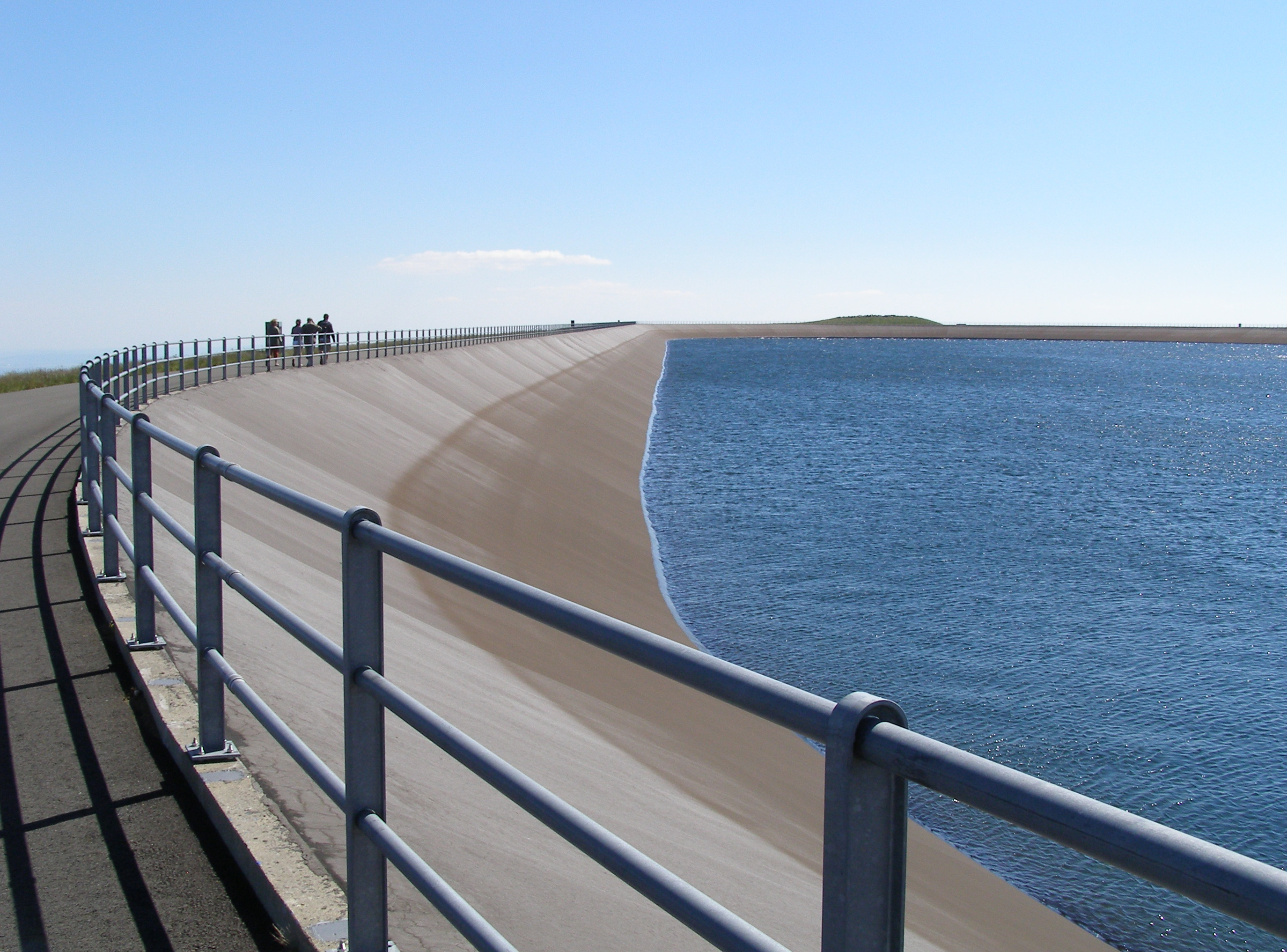 Dlouhé Stráně - přečerpávací vodní elektrárna